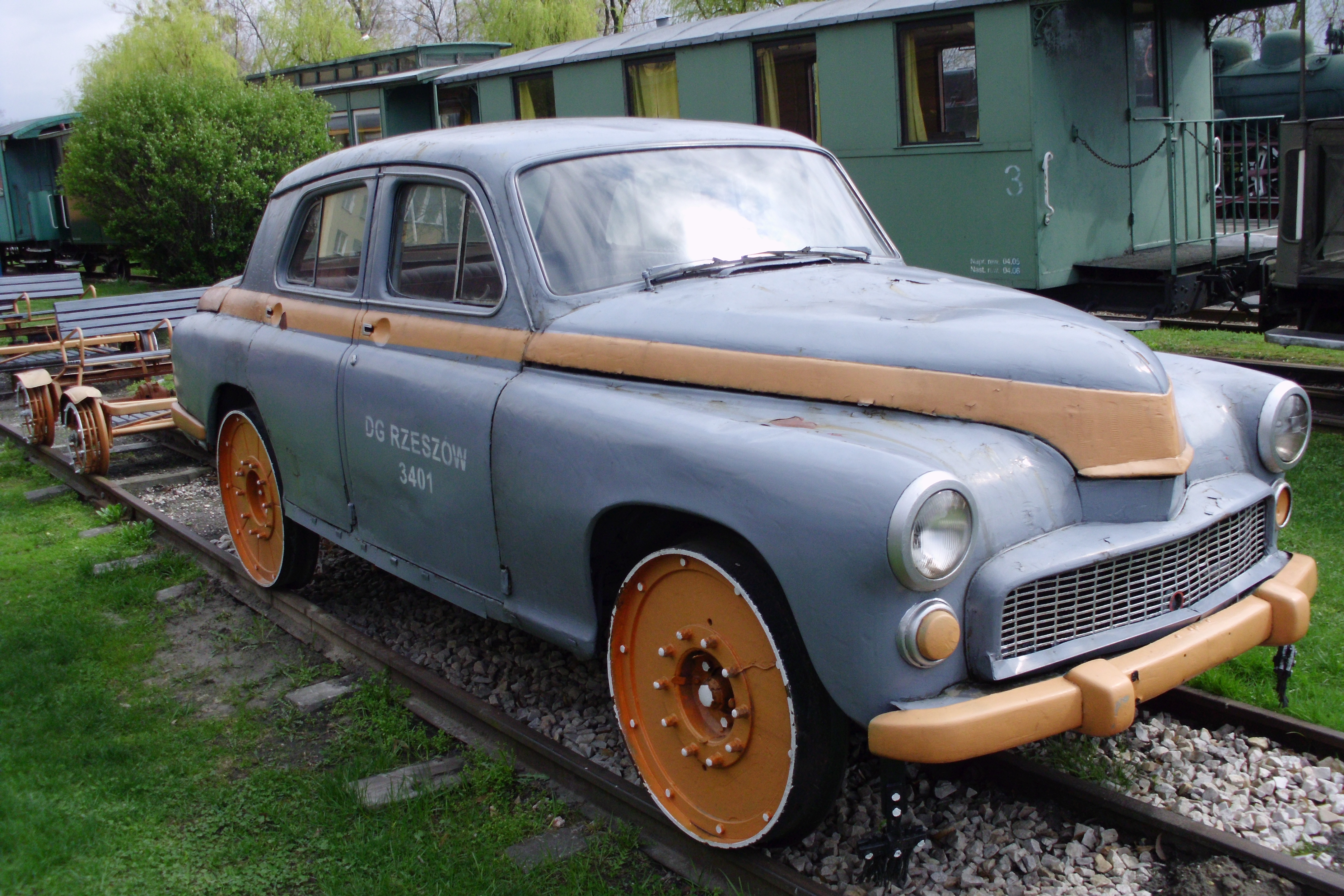 Muzeum Kolei Wąskotorowej w Sochaczewie. Samochód na szynach.